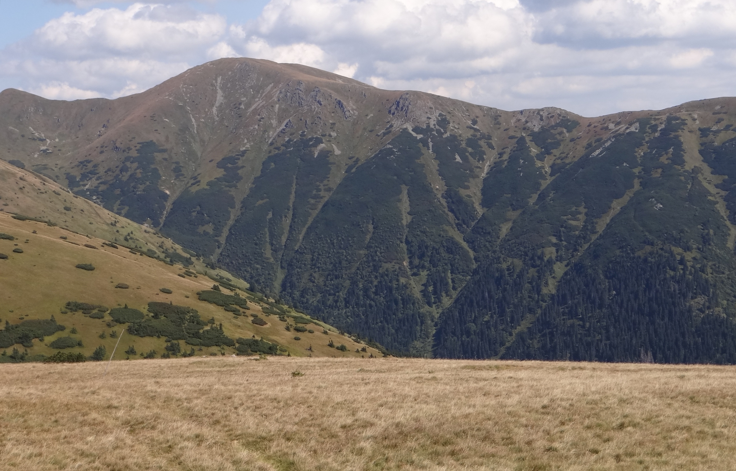 Skalka (1980 m). Widok od zachodu